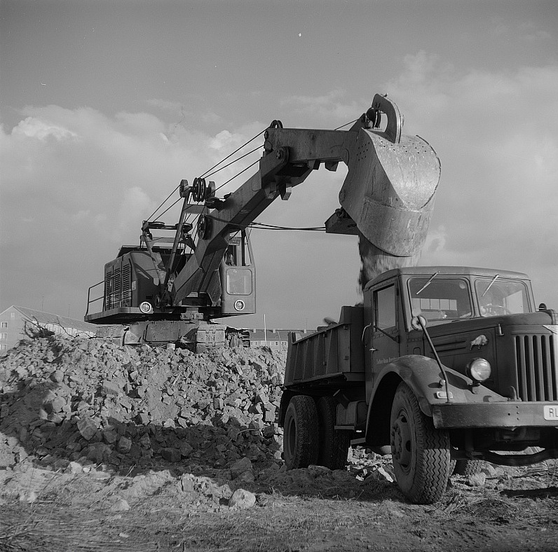 Original image description from the Deutsche Fotothek Dresden. Beladung eines Kippers durch Tieflöffelbagger auf Kettenfahrwerk